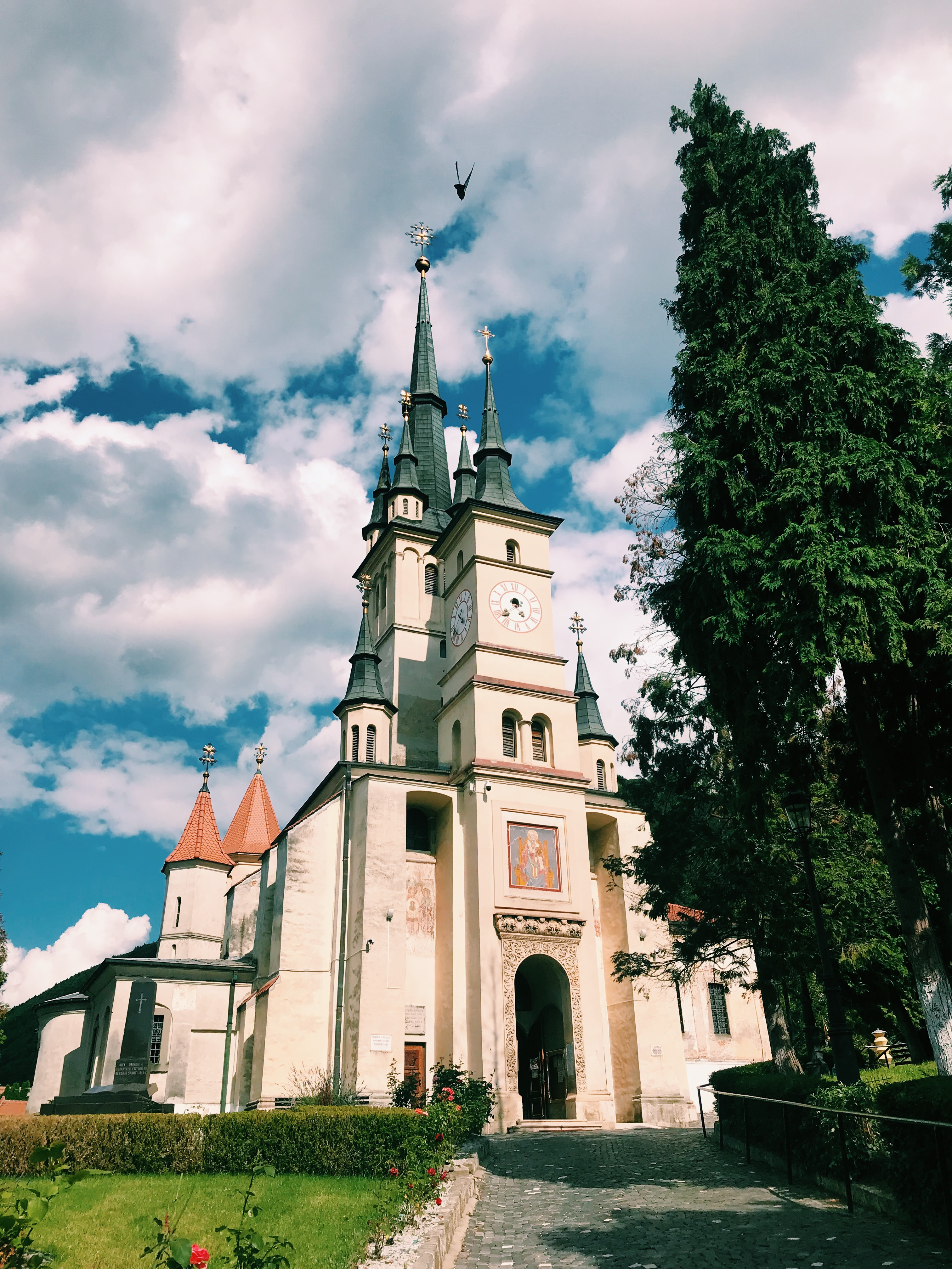 Saint Nicholas Kilisesi, Transilvanya'nın Braşov şehrinde bulunmaktadır.